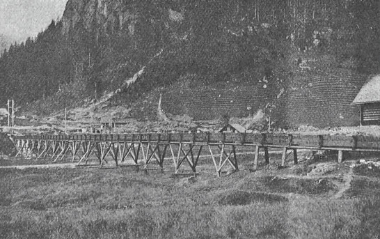 Holzgerinne über den Arniboden, das vor dem Beginn des Aufstaus des Arnisees das Wasser vom Zulauf des Leitschachbaches und des Intschialp Baches direkt in die Druckleitung führte.